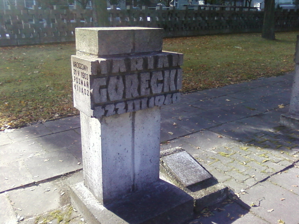 Nagrobek ks. Mariana Góreckiego na zbiorowej mogile Cmentarz Zasłużonych Gdańsk Zaspa.